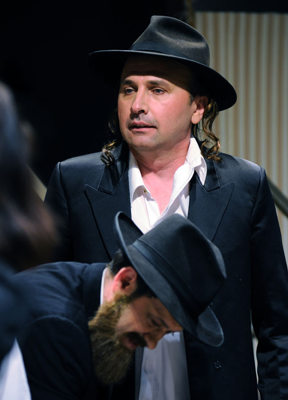 В спектакле "Размороженный"